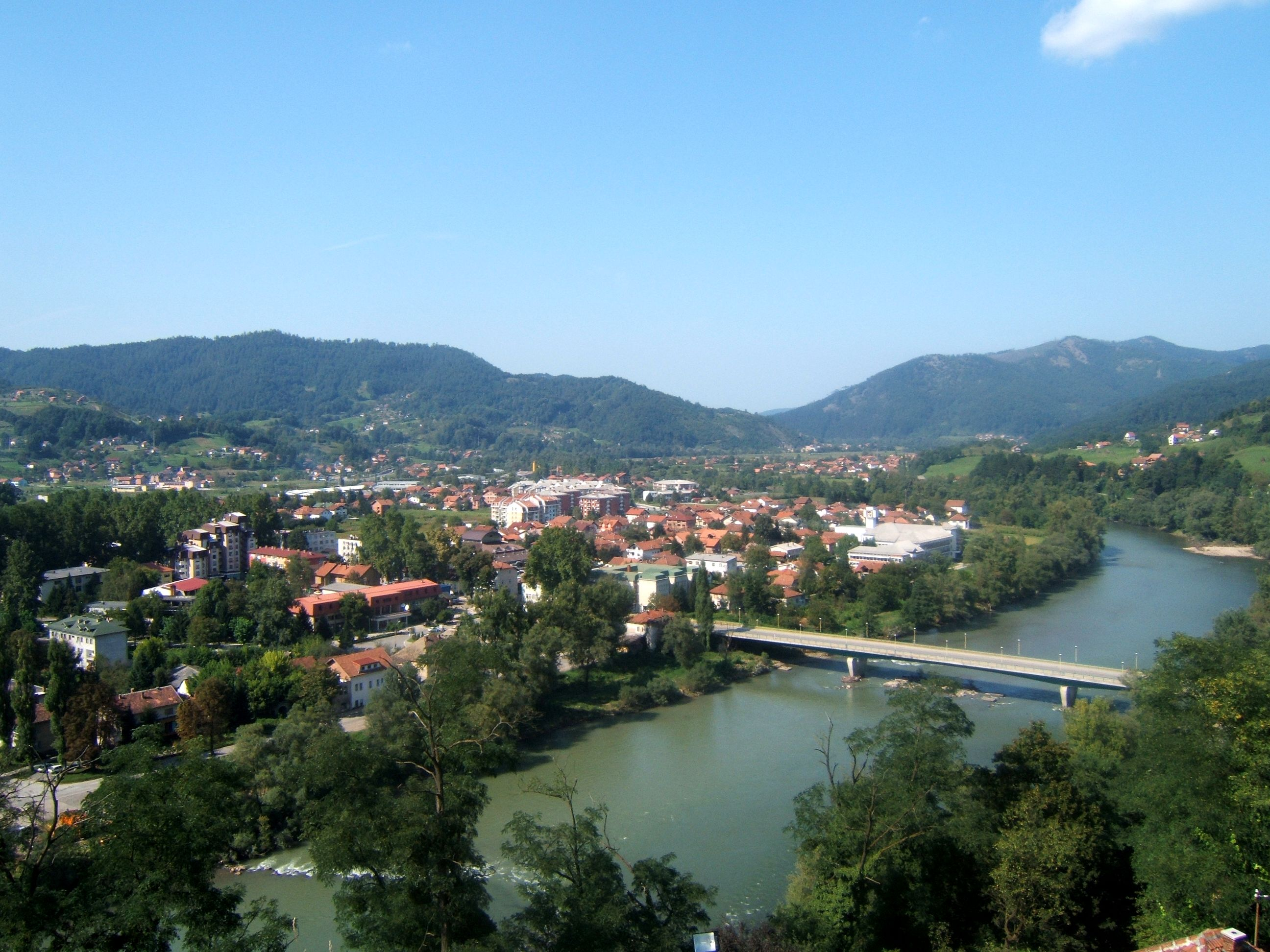 Maglaj, Bosnia and Herzegovina.